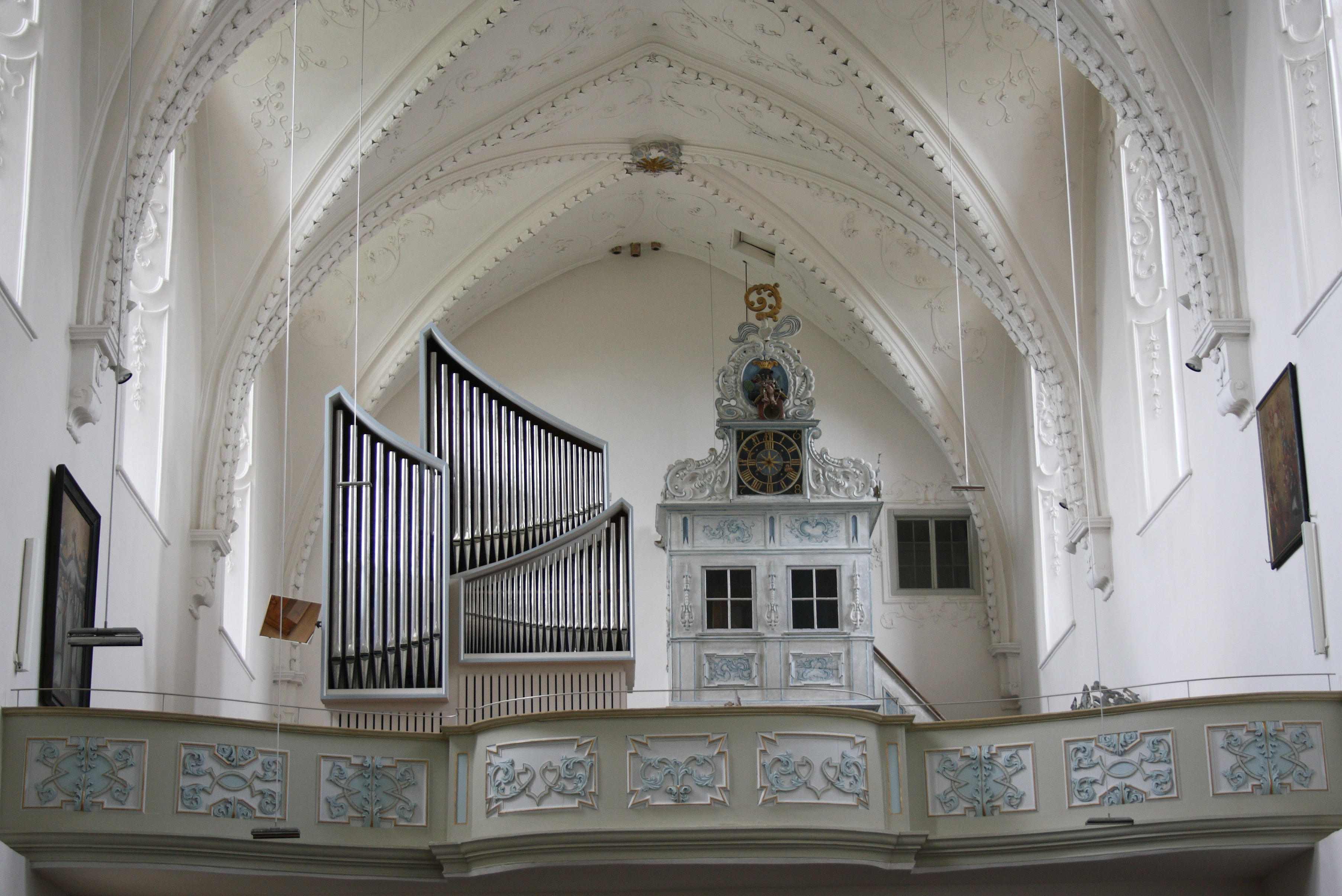 Katholische Pfarrkirche Mariä Himmelfahrt, ehemalige Kirche des Zisterzienserinnenklosters in Kirchheim am Ries im Ostalbkreis (Baden-Württemberg), Orgelempore